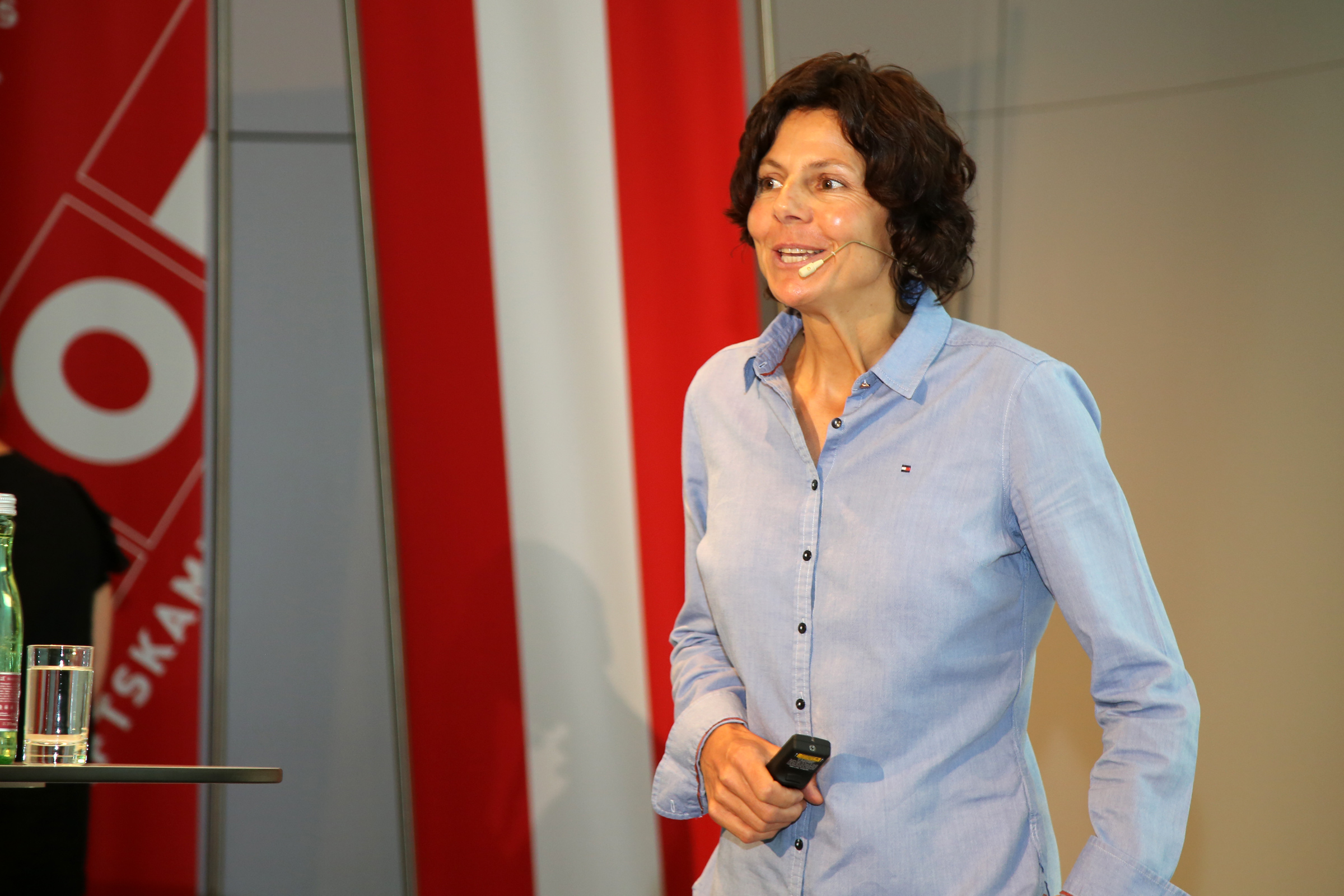 Kaltenbrunner_Gerlinde,Bergsteigerin-3266